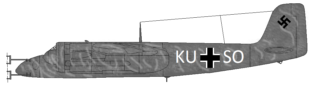 Seitenansicht einer Focke-Wulf Ta 154 im Tarnkleid